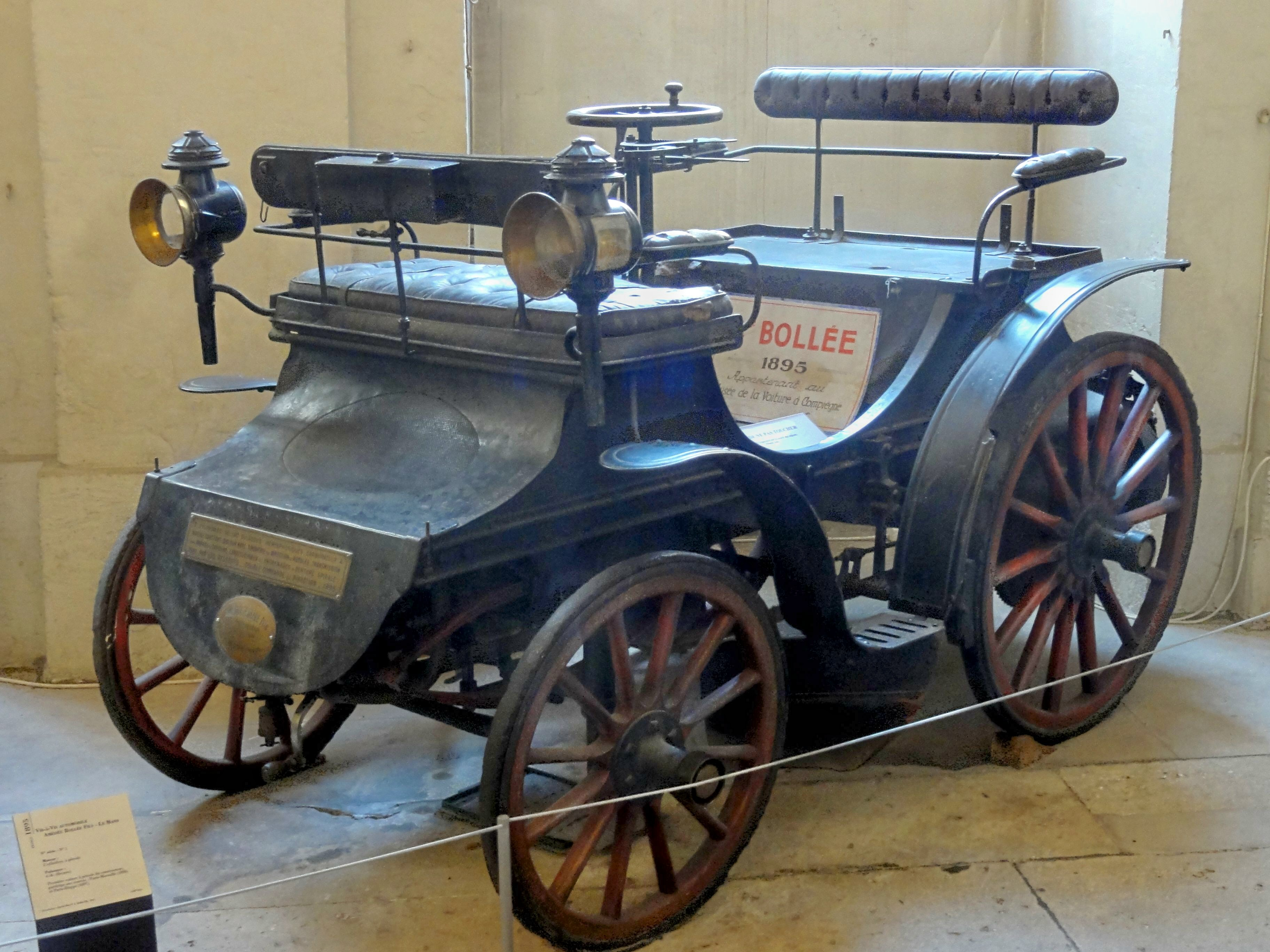 Vis-à-vis automobile Amédée Bollée fils, Le Mans, 1895.